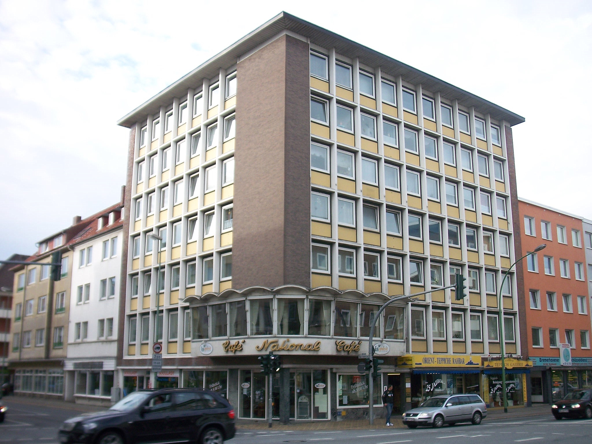 Eckhaus